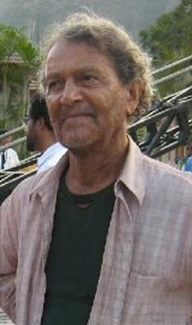 O ator brasileiro Nelson Xavier quando foi entrevistado pela radialista Natália (Nathy) Silva